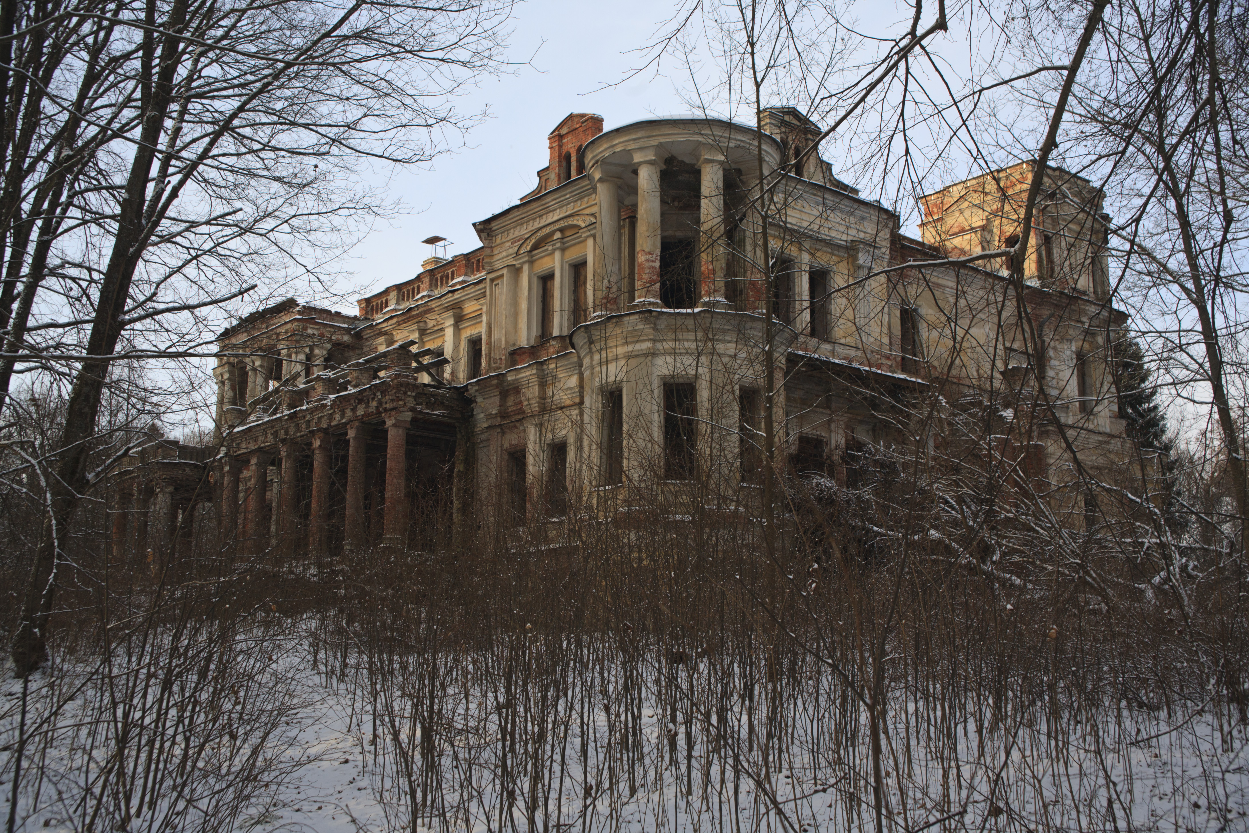 Парк усадьбы Павлищев бор: Юхновский район, в трех километрах от дороги Калуга - Вязьма, на левом берету р. Теча, д.Павлищев Бор, 10 км от с.Щелканово,Юхновский район, This image is related to the protected area of Russia number 4010221